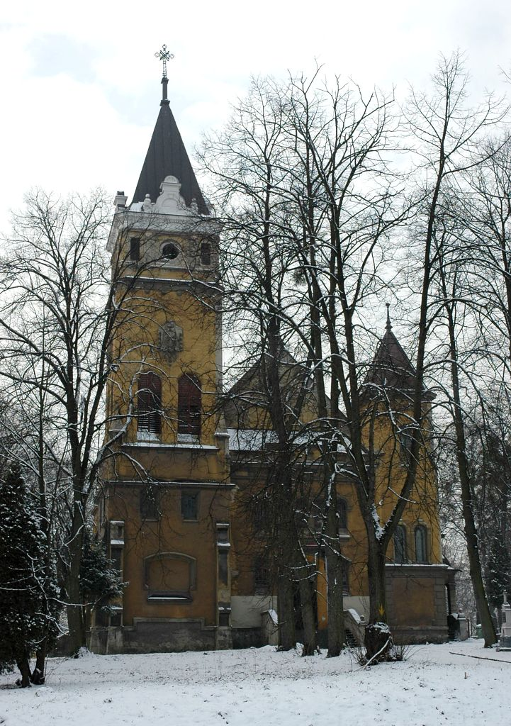 Kostel Neposkvrněného početí Panny Marie, Ostrava-Radvanice